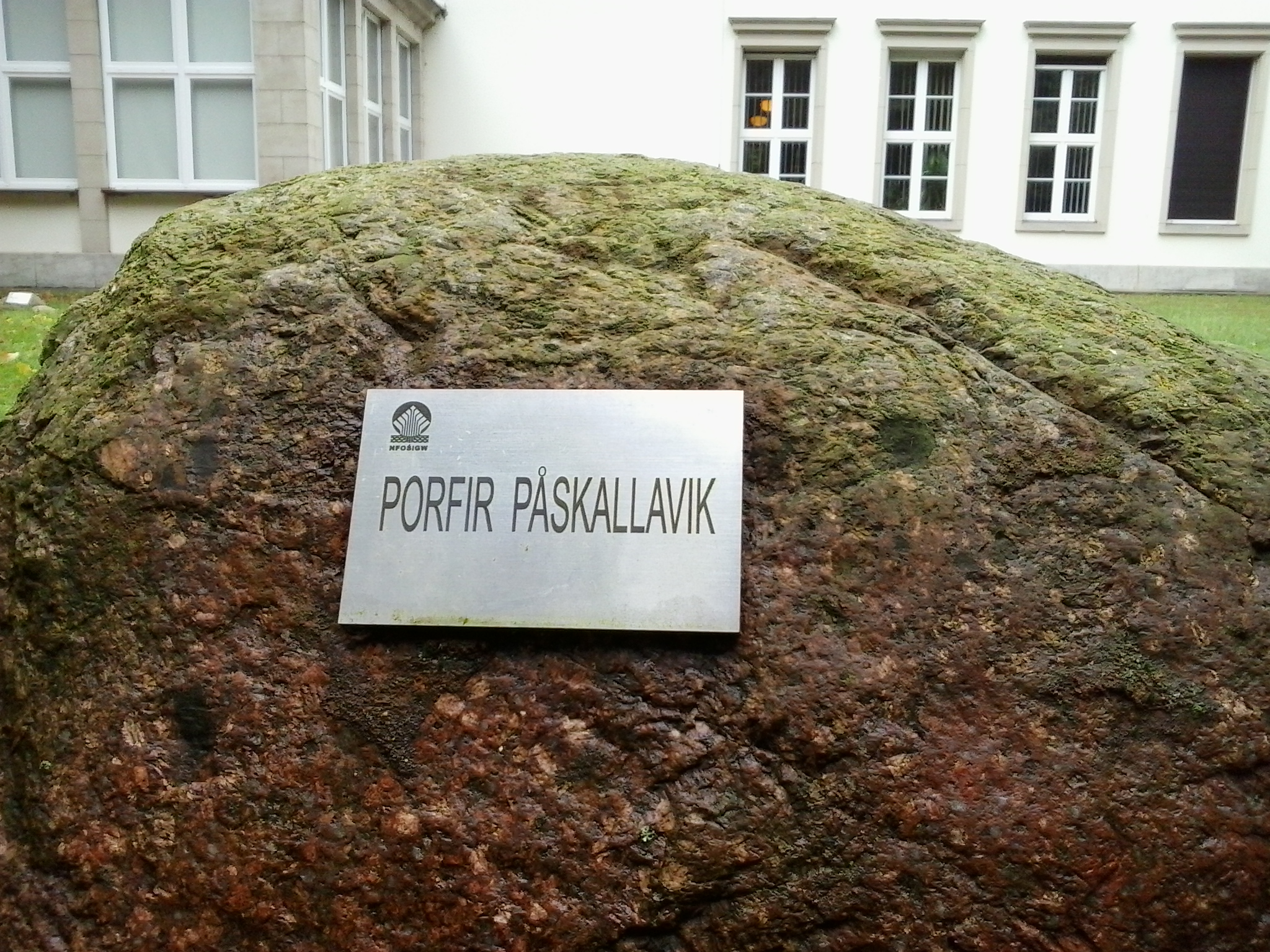 Dyrekcja i Muzeum Wielkopolskiego Parku Narodowego w Jeziorach.